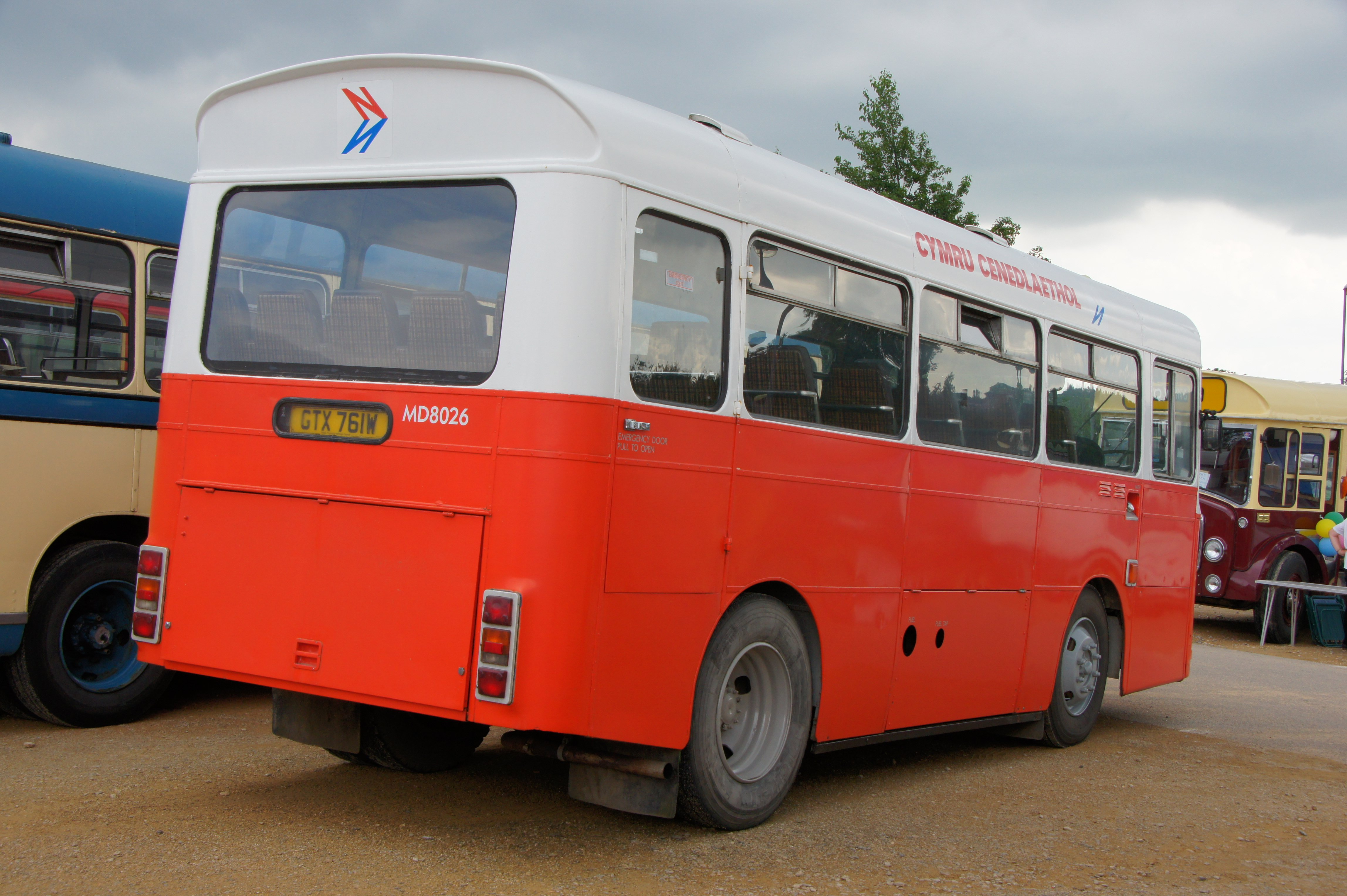 GTX751W-1 120812 CPS